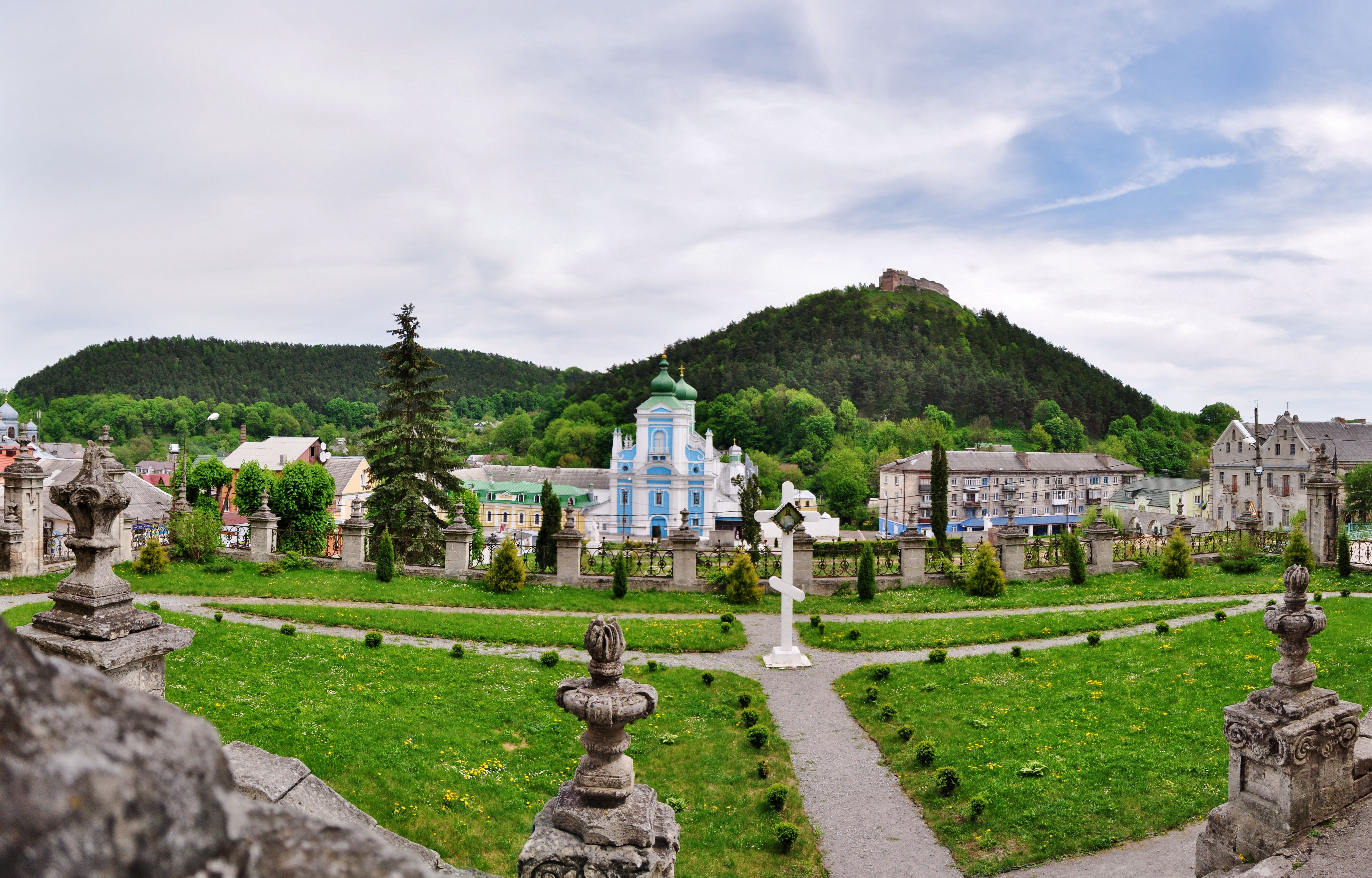 Кременецькі Гори. Гора Бона. Колишній монастир францісканців